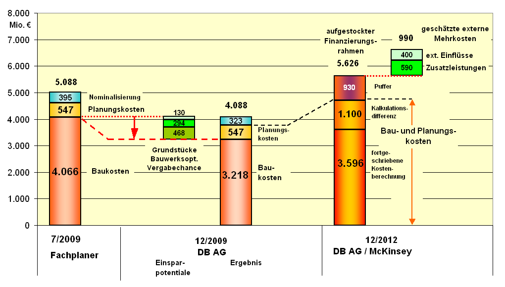 Projekt "Stuttgart 21" - Entwicklung der Kostenberechnung, Stand Dez. 2012